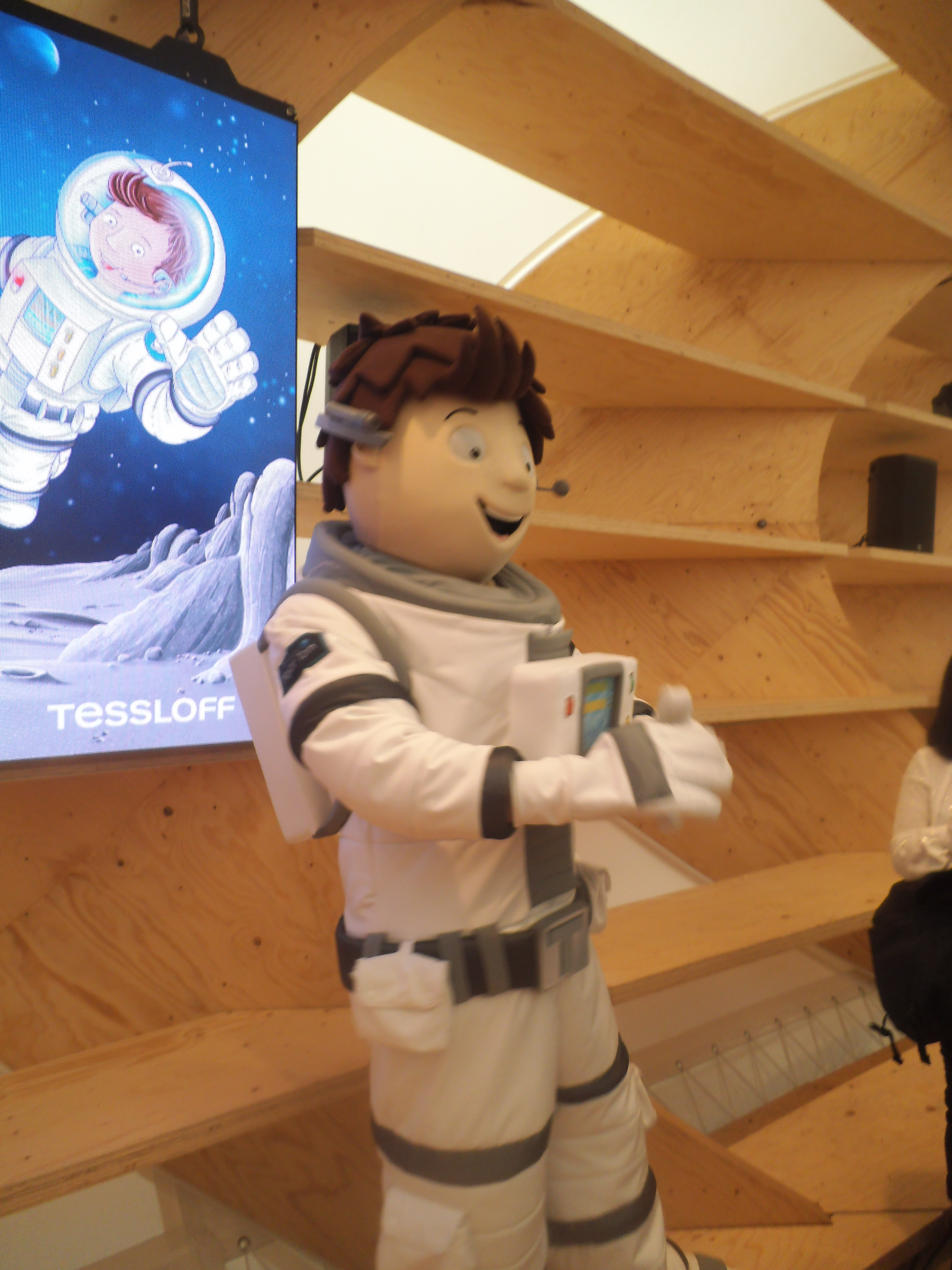 Überlebensgroße belebte Maskottchenfigur des kleinen Major Tom, welche Zuschauer begrüßt, auf der Frankfurter Buchmesse 2019.